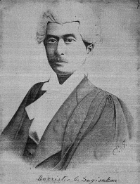 向坂兌肖像画 向坂清所蔵 バリスター合格記念のもの